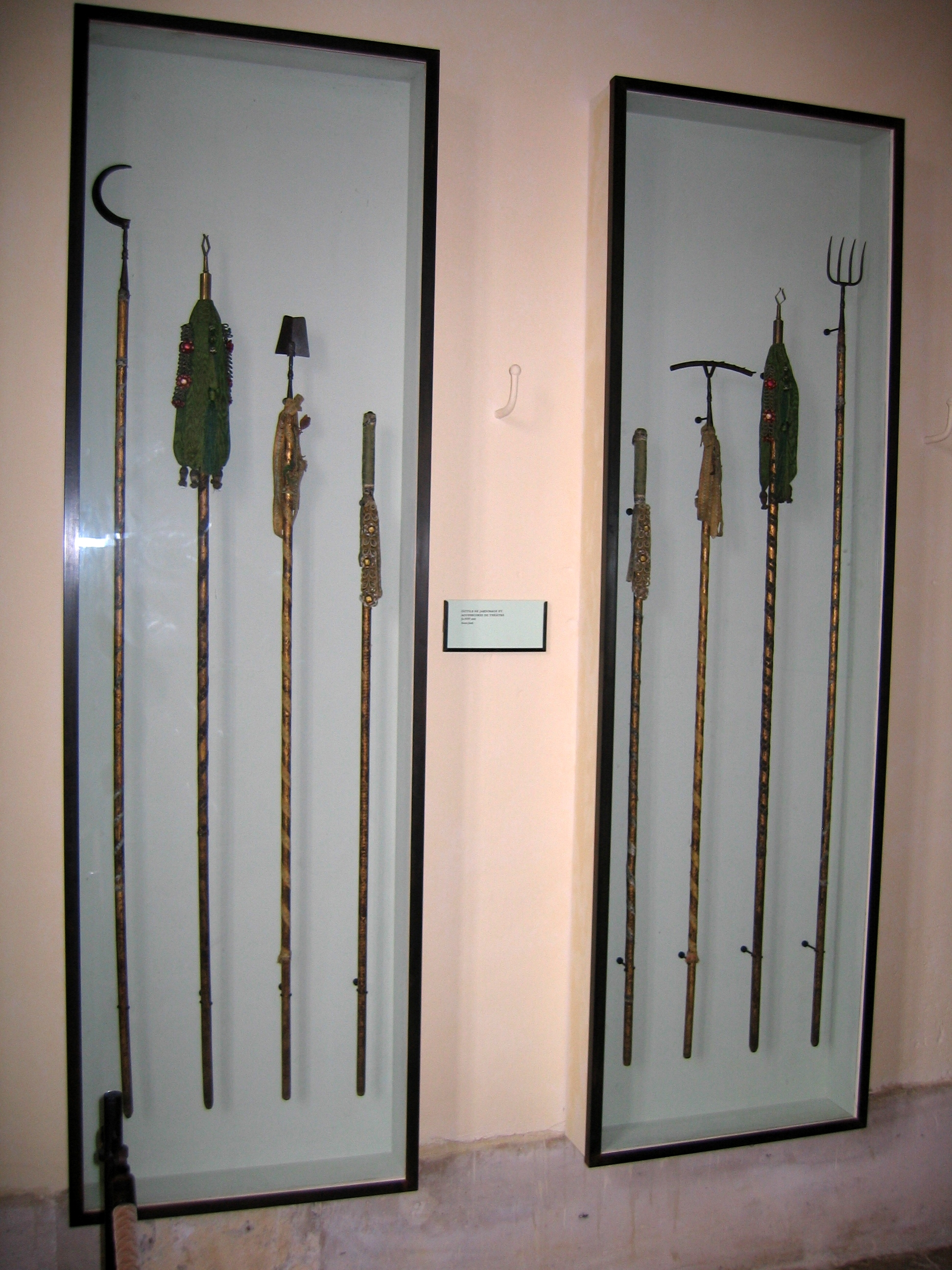 Des petits outils de jardinage dans le petit Trianon